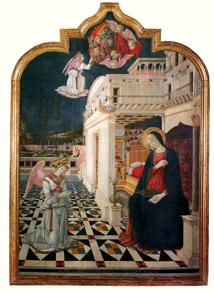 Annonciation_1470